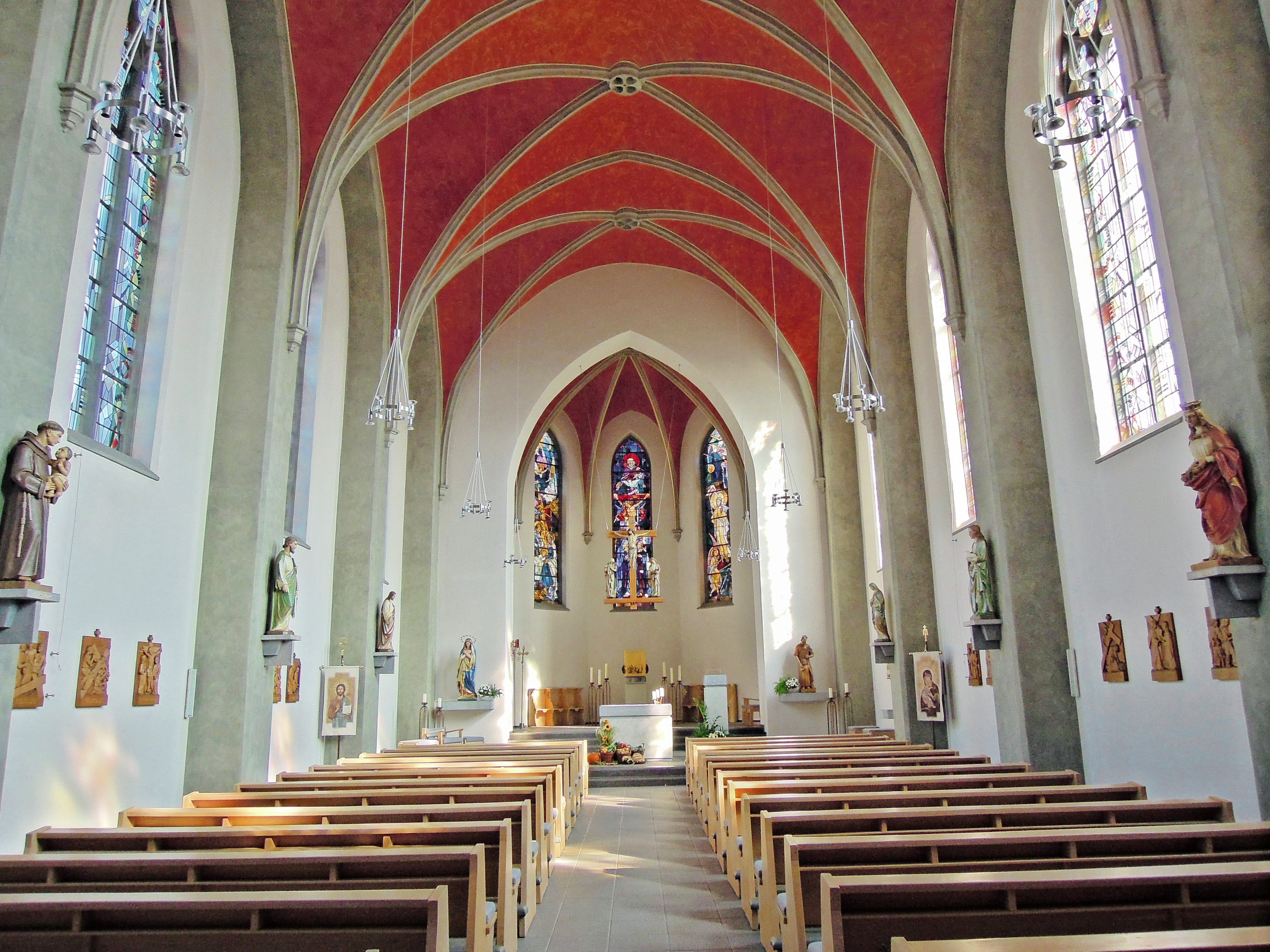 Kath. Kirche St. Pankratius in Beggendorf